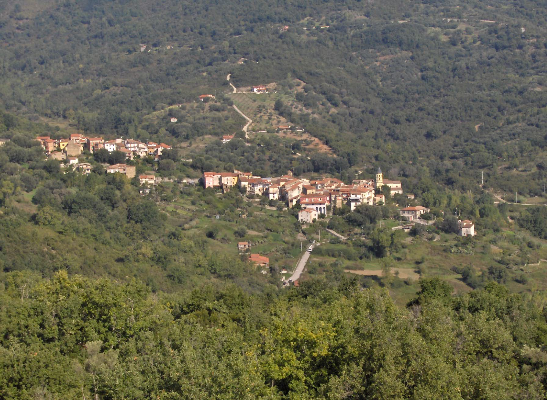 San Nazario, frazione di San Mauro La Bruca.